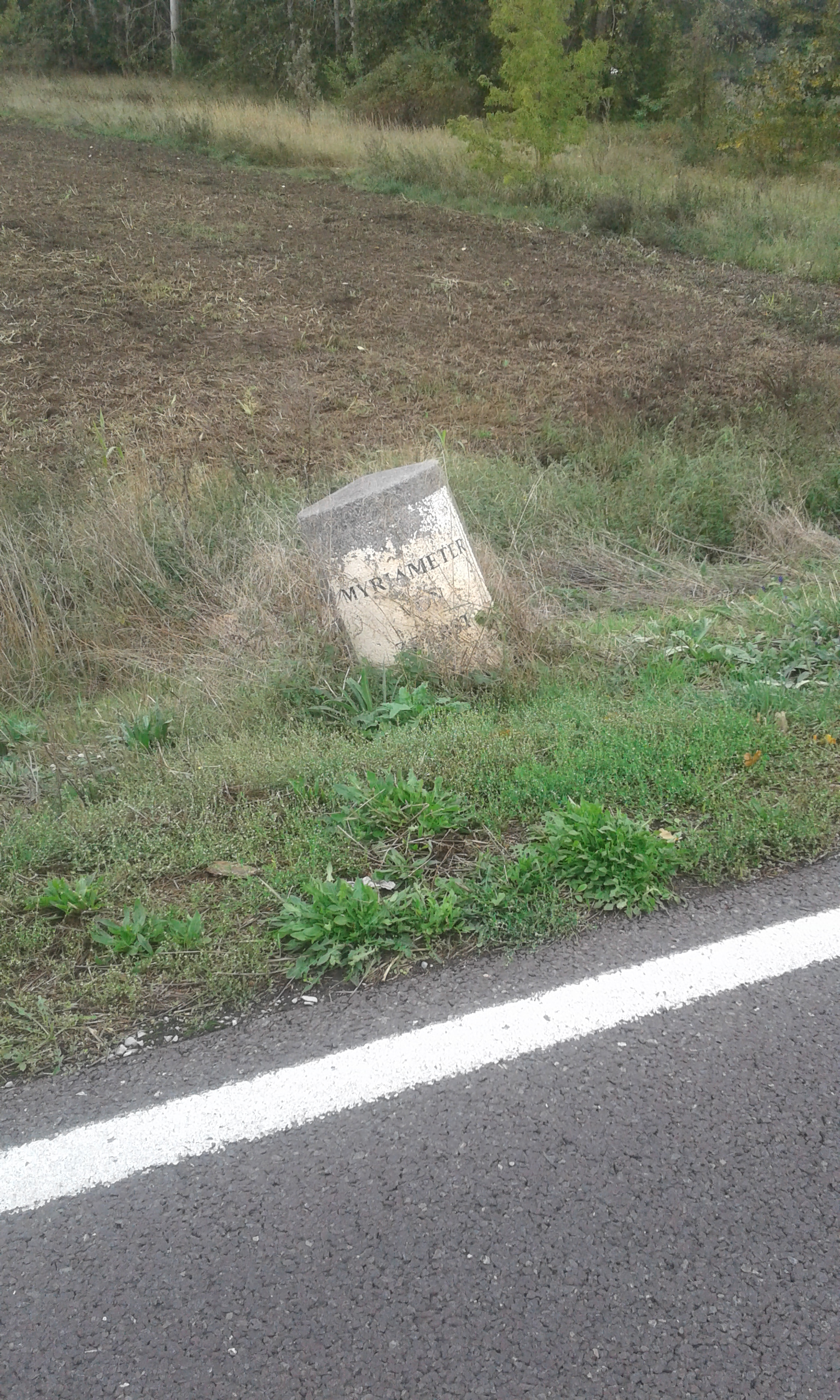 Myriameterstein